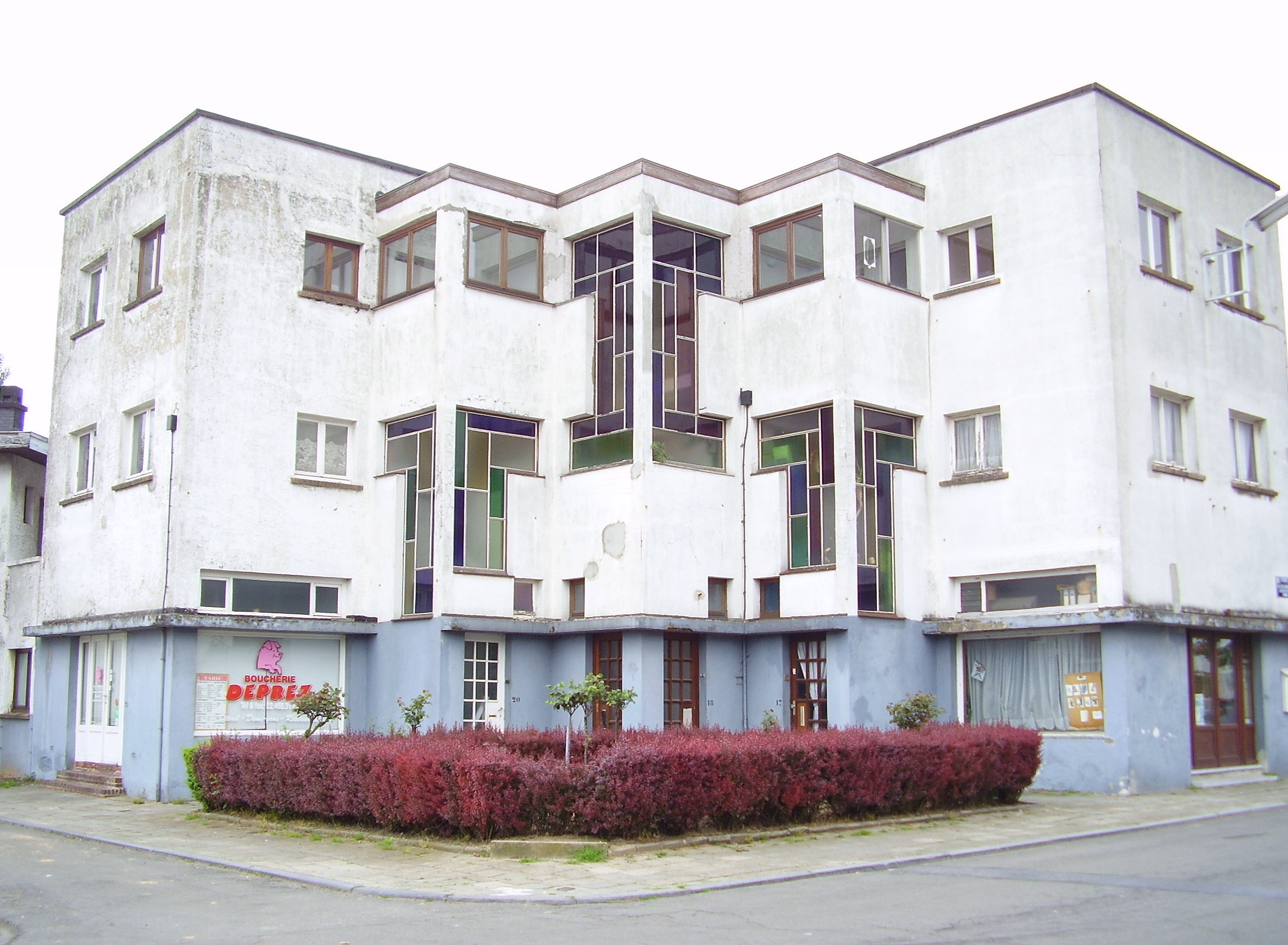 La Cité Moderne 1925 (architecte Victor Bourgeois) - Berchem-Sainte-Agathe (Bruxelles)